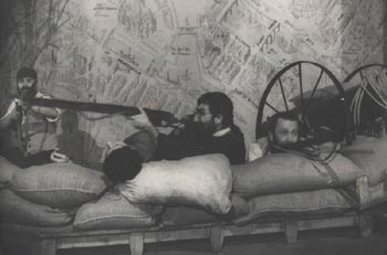 Cezmi Baskın AST'da oynanan Komün Günleri oyununda